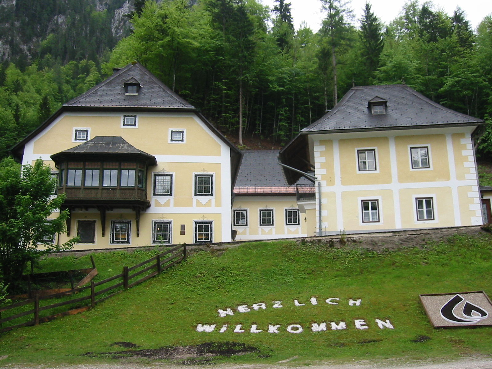 Ehem. Hammerherrenhaus, Tulleck'sches Gewerkenhaus